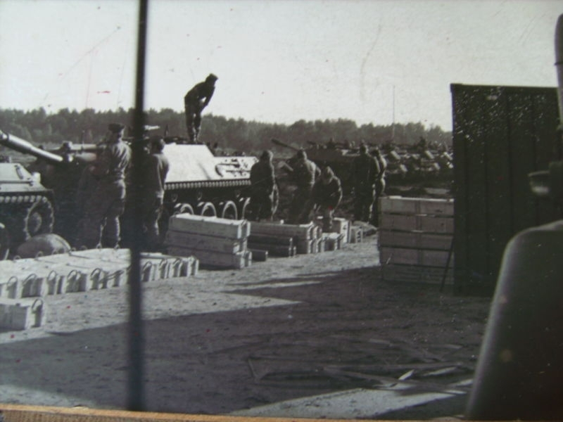 Kanonenjgdpanzer 4-5 /Aufmunitionieren auf der Schießbahn Lager Heuberg